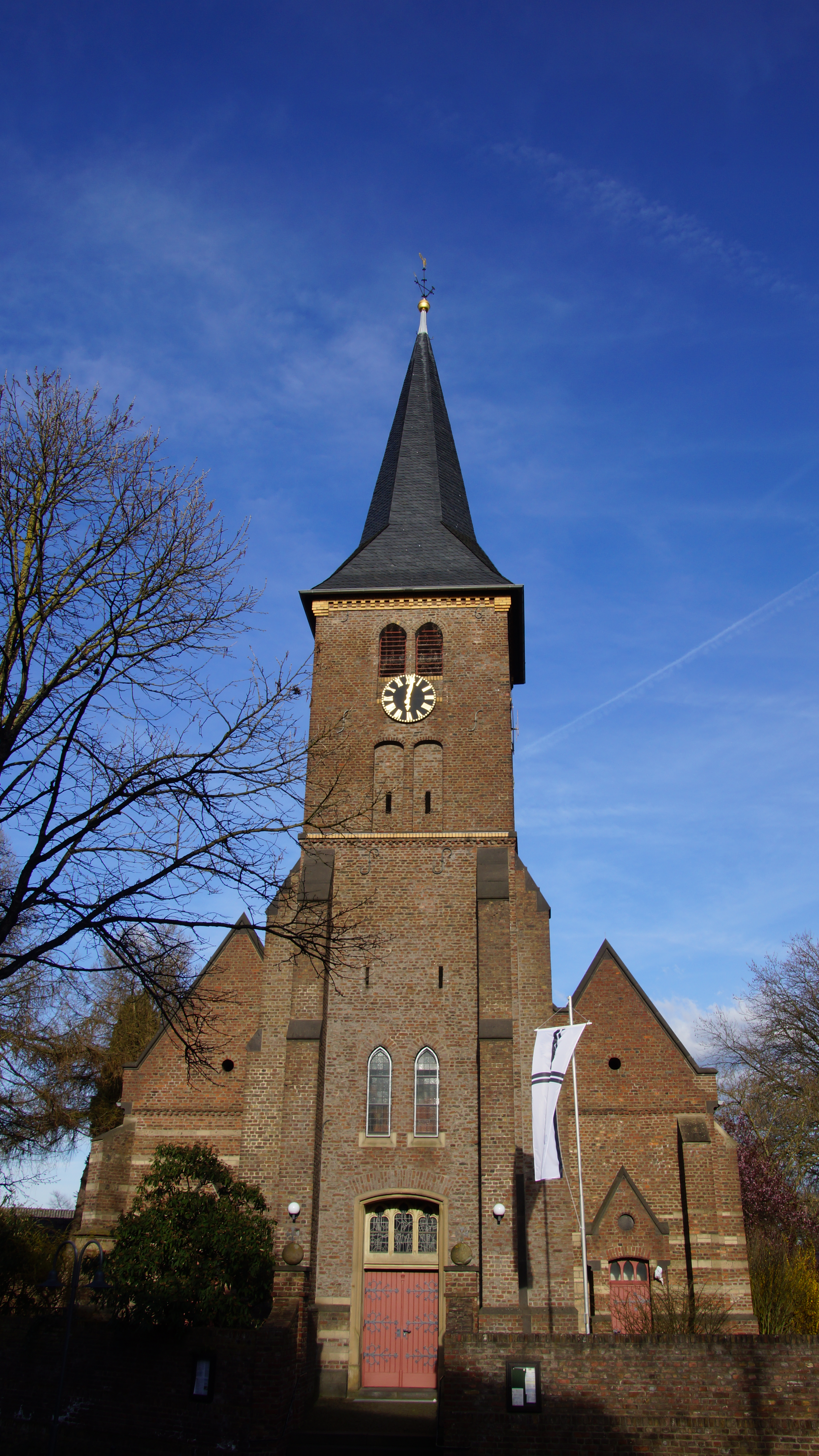 St. Johann Baptist in Bergheim-Niederaußem